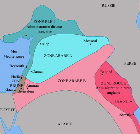 carte du découpage du Moyen-Orient suivant les accords Sykes-Picot